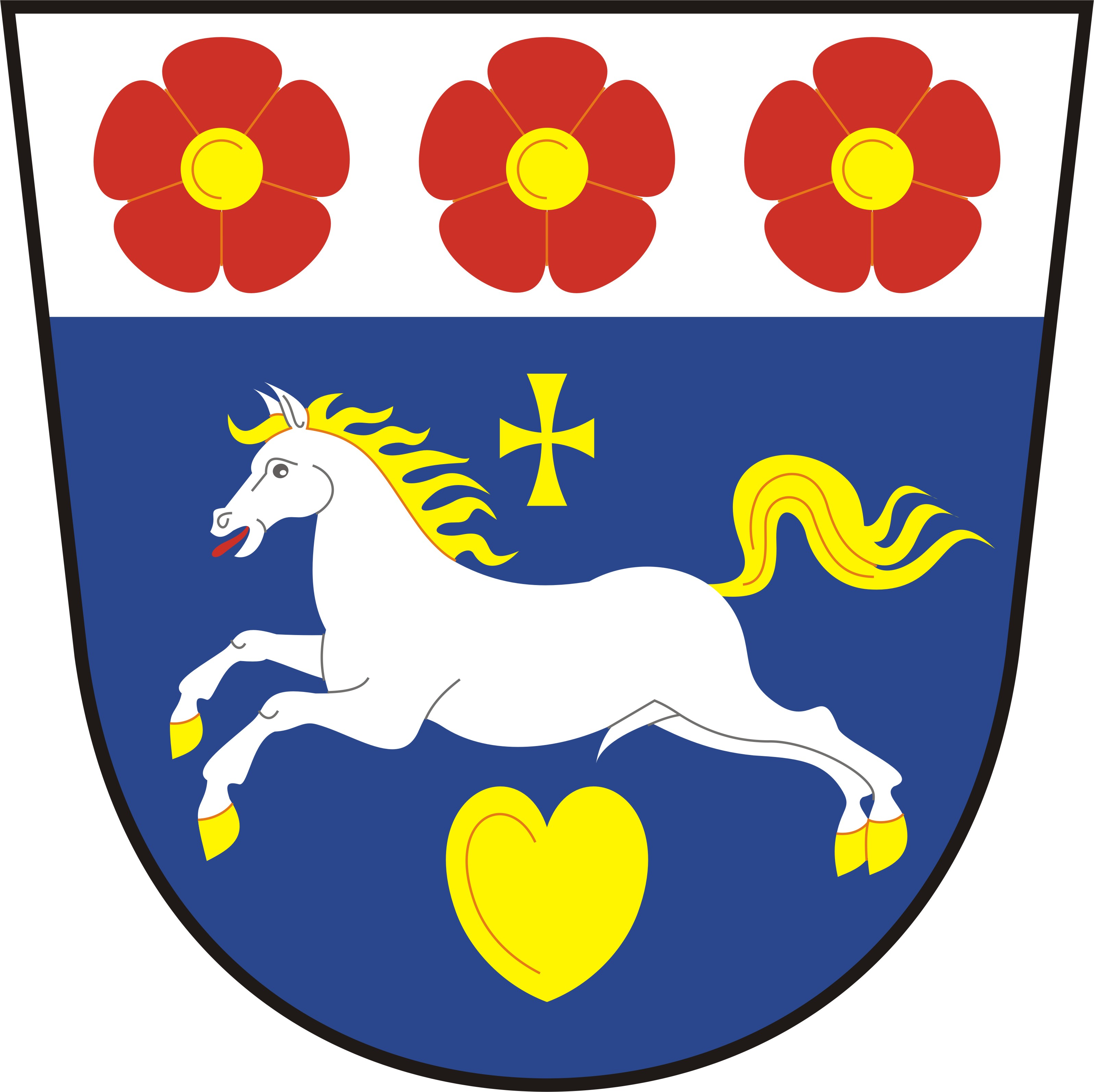 Vlajka obce Oslavice